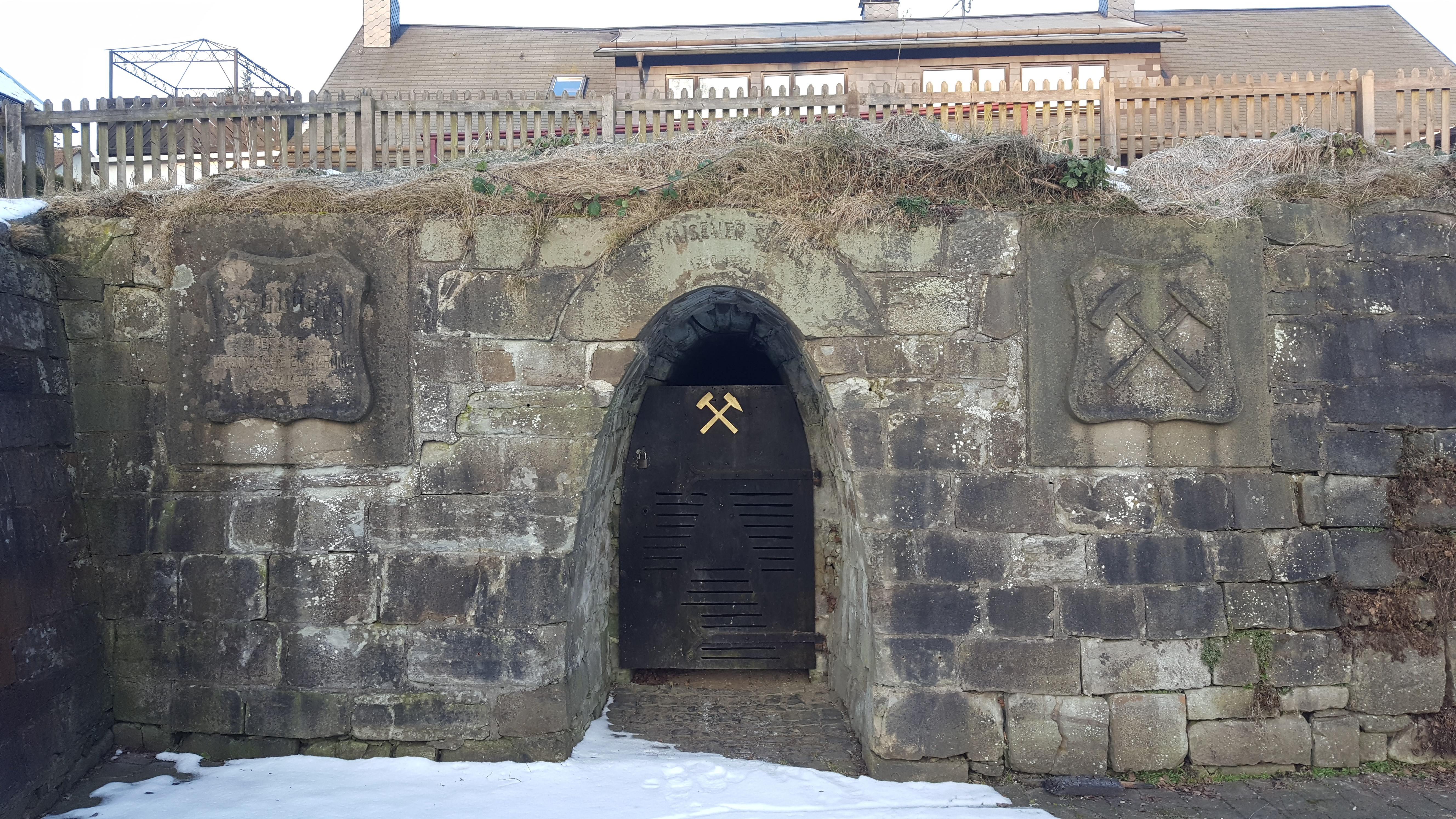 Stollenmundloch des Tiefen Müsener Stollens der Grube Stahlberg in Müsen/NRW